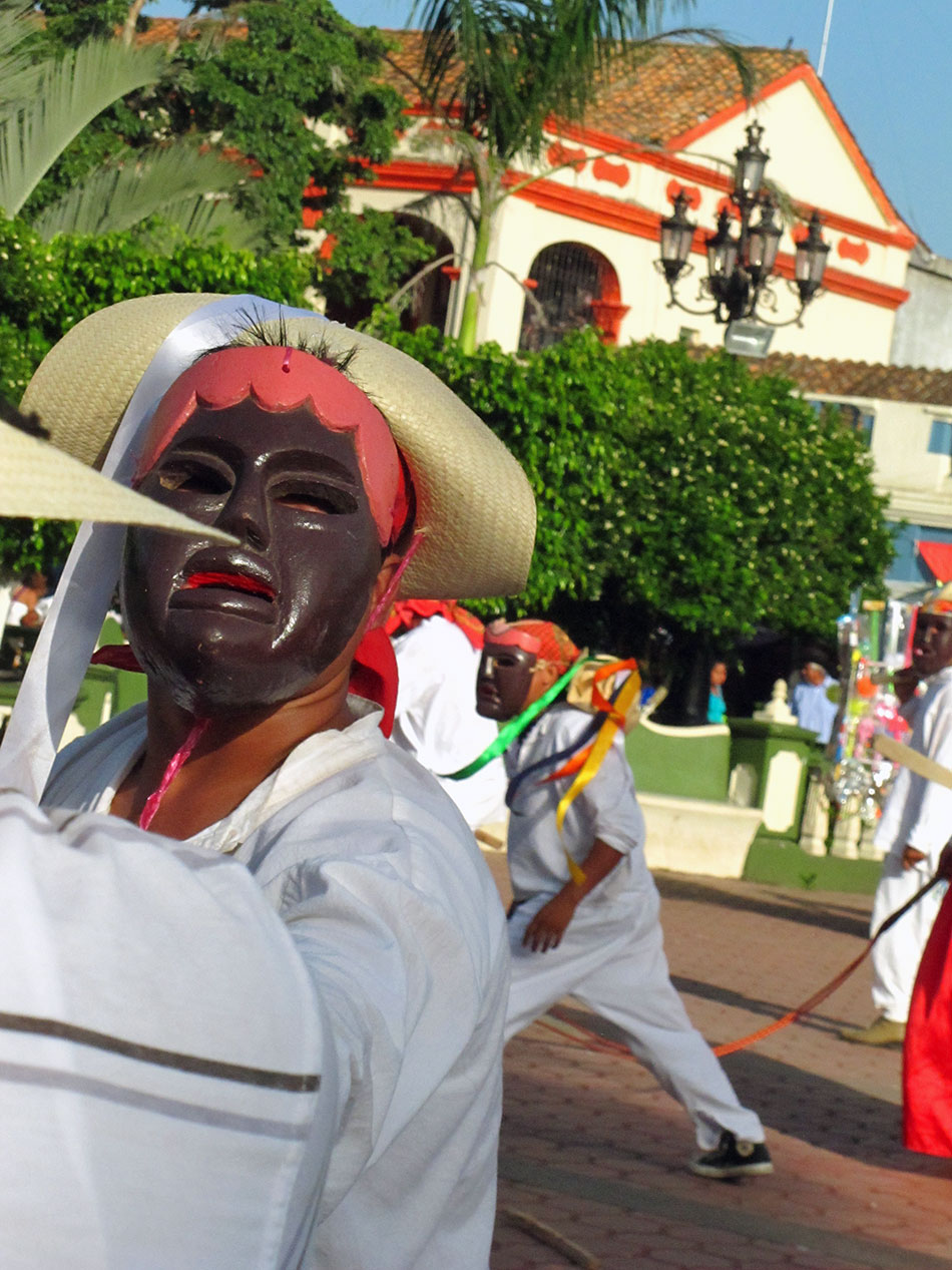 Baile con mascaras en Santiago Tuxtla, Veracruz.